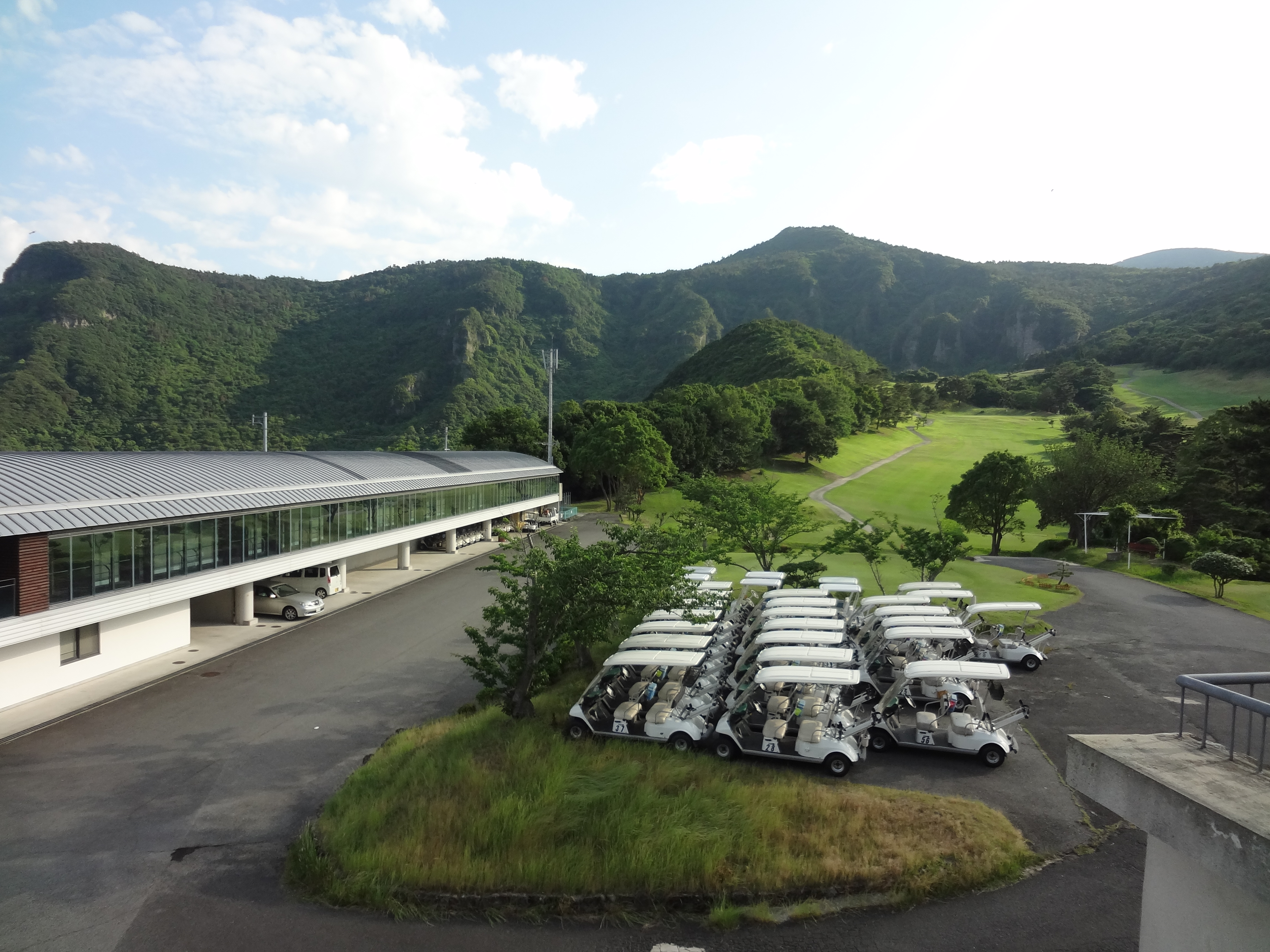 小豆島シーサイドゴルフクラブの宿泊設備と1番ホール。